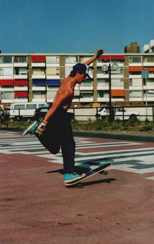 Freestyle: Hans, tailwheelie grab, Zandvoort Foto door vriend van Hans